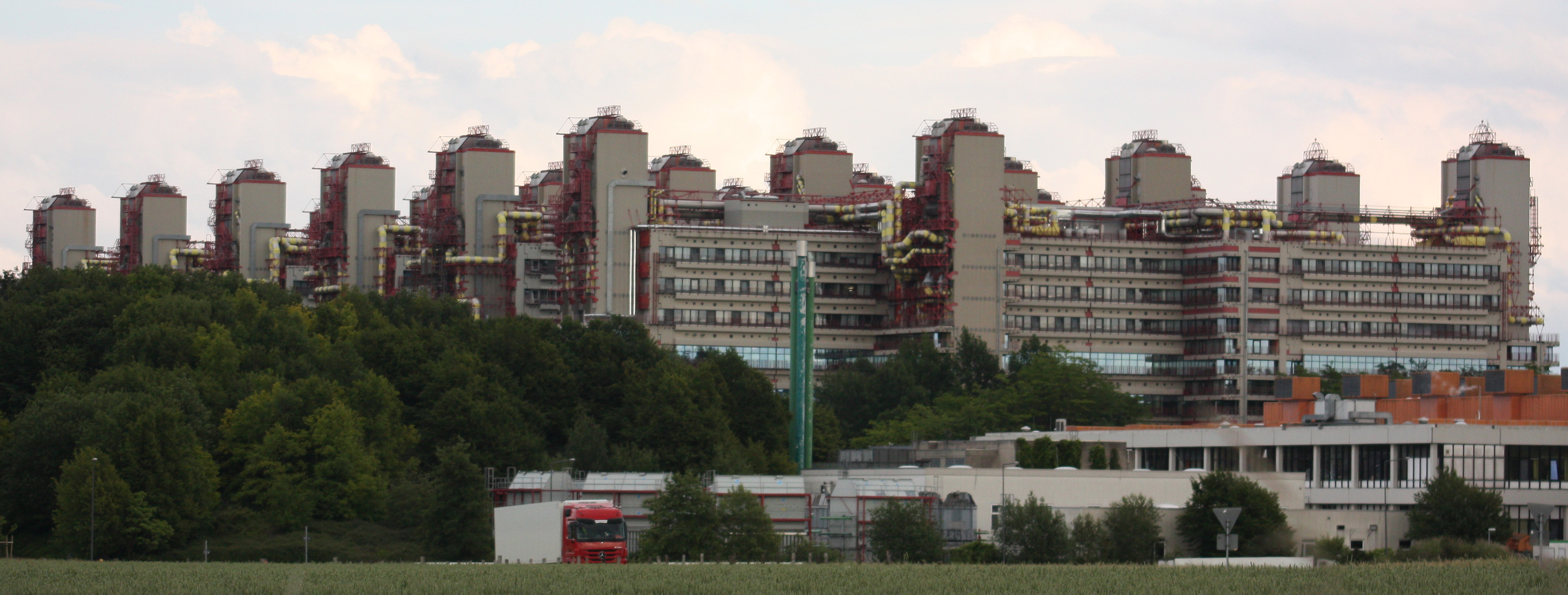 Aachener Klinikum (Seitenansicht)